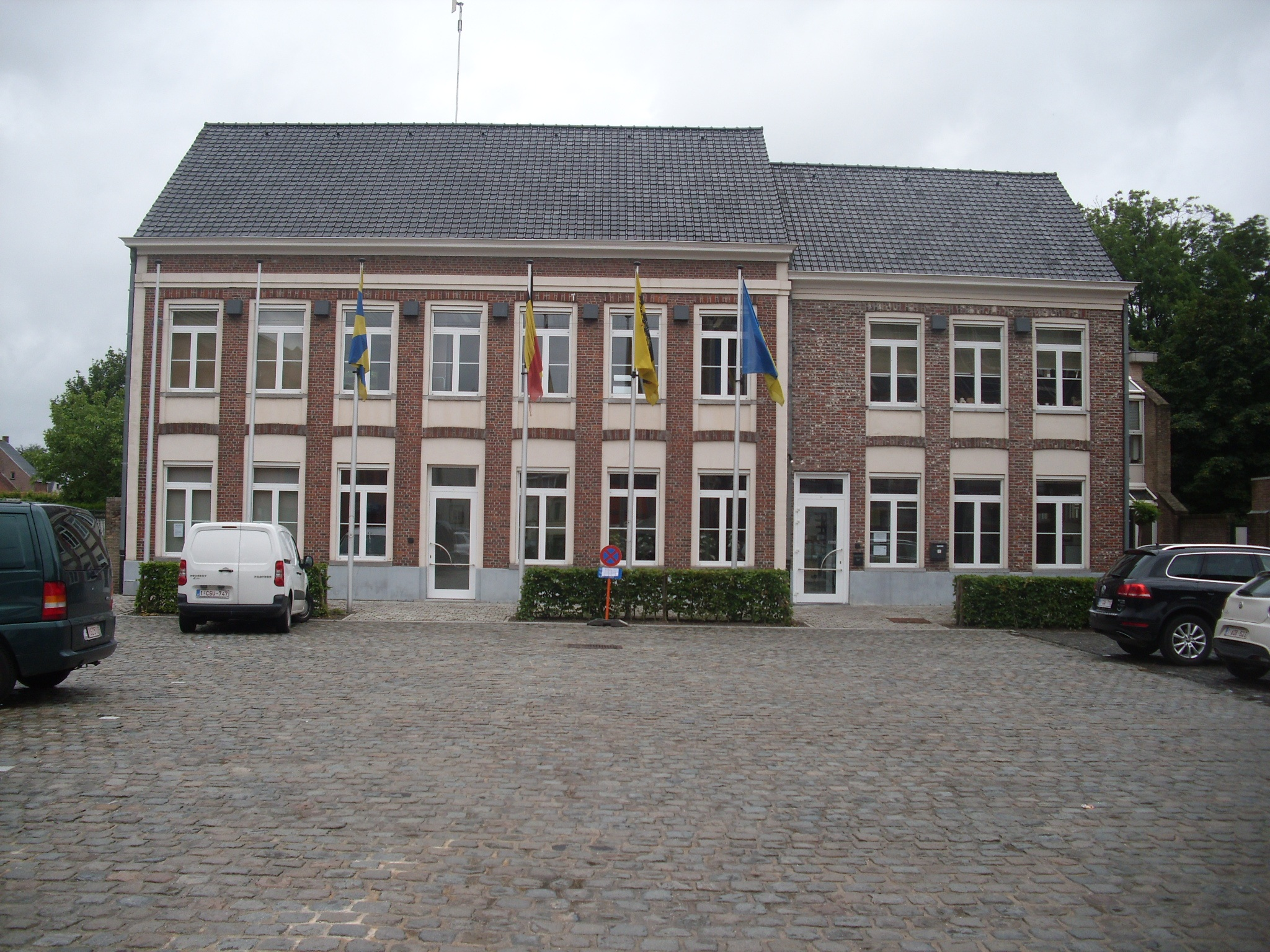 Gemeentehuis van Dentergem - Kerkstraat 1 - Dentergem - West-Vlaanderen - België